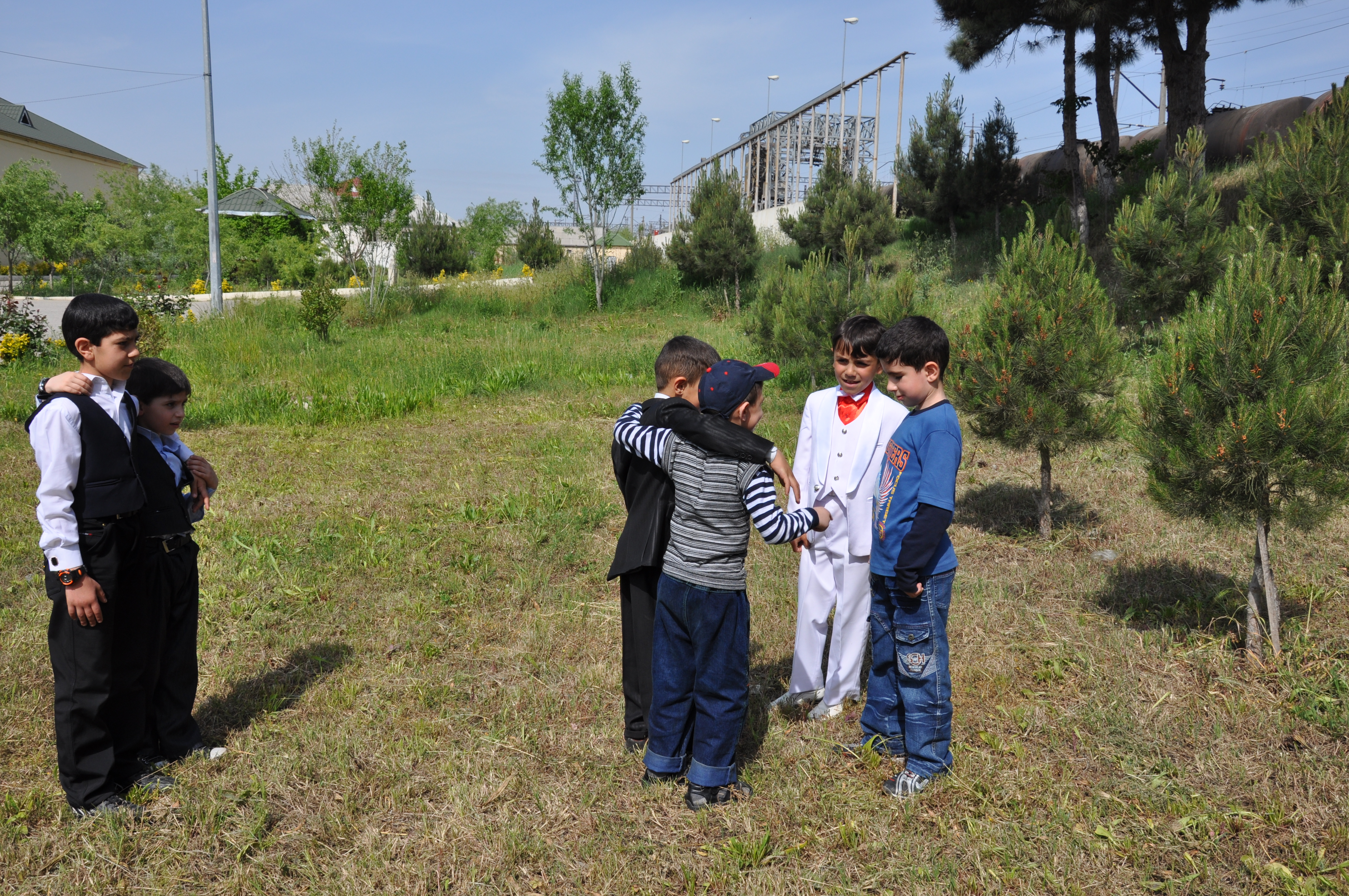 Halay - Azərbaycanda uşaq və gənclər arasında toy, eləcə də el şənliklərində dəstələrə bölünərək oynanılan bütün oyunların başlanğıc forması.